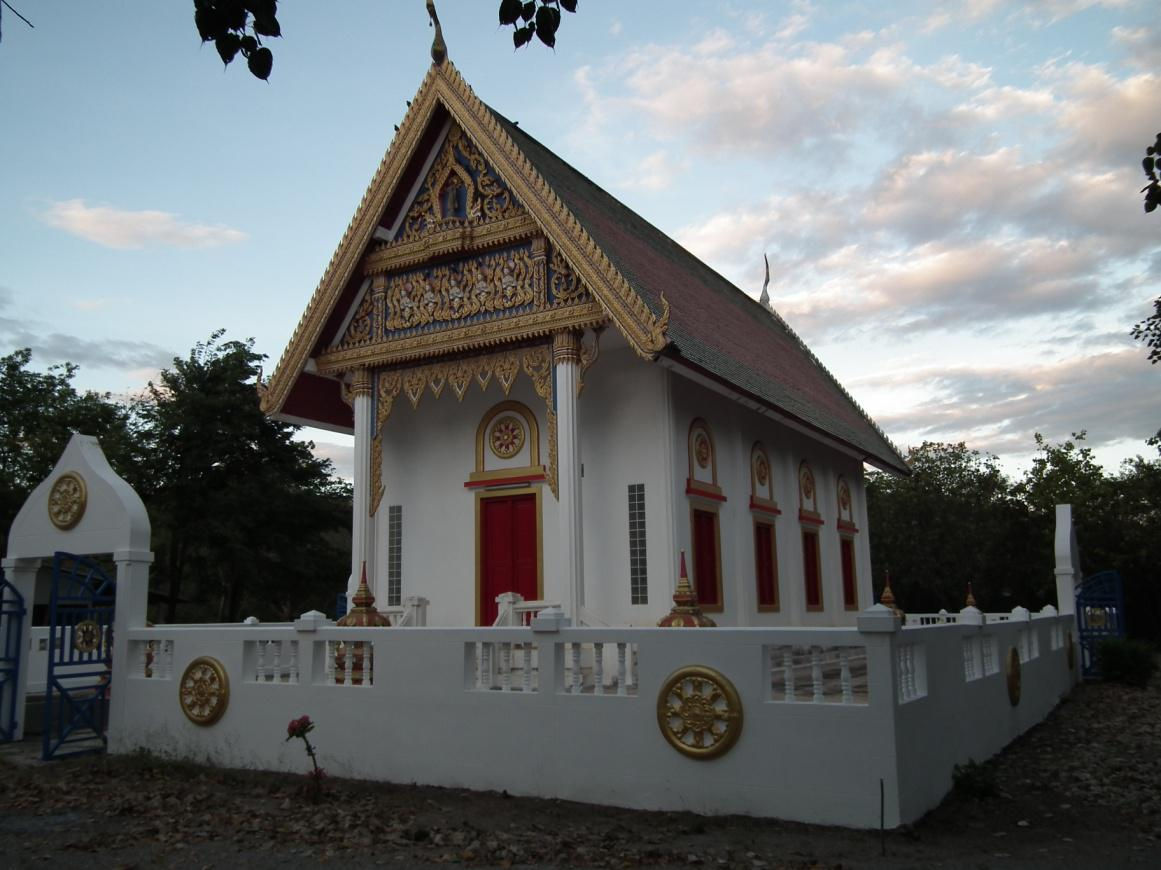 อุโบสถ วัดบ้านหินลับ